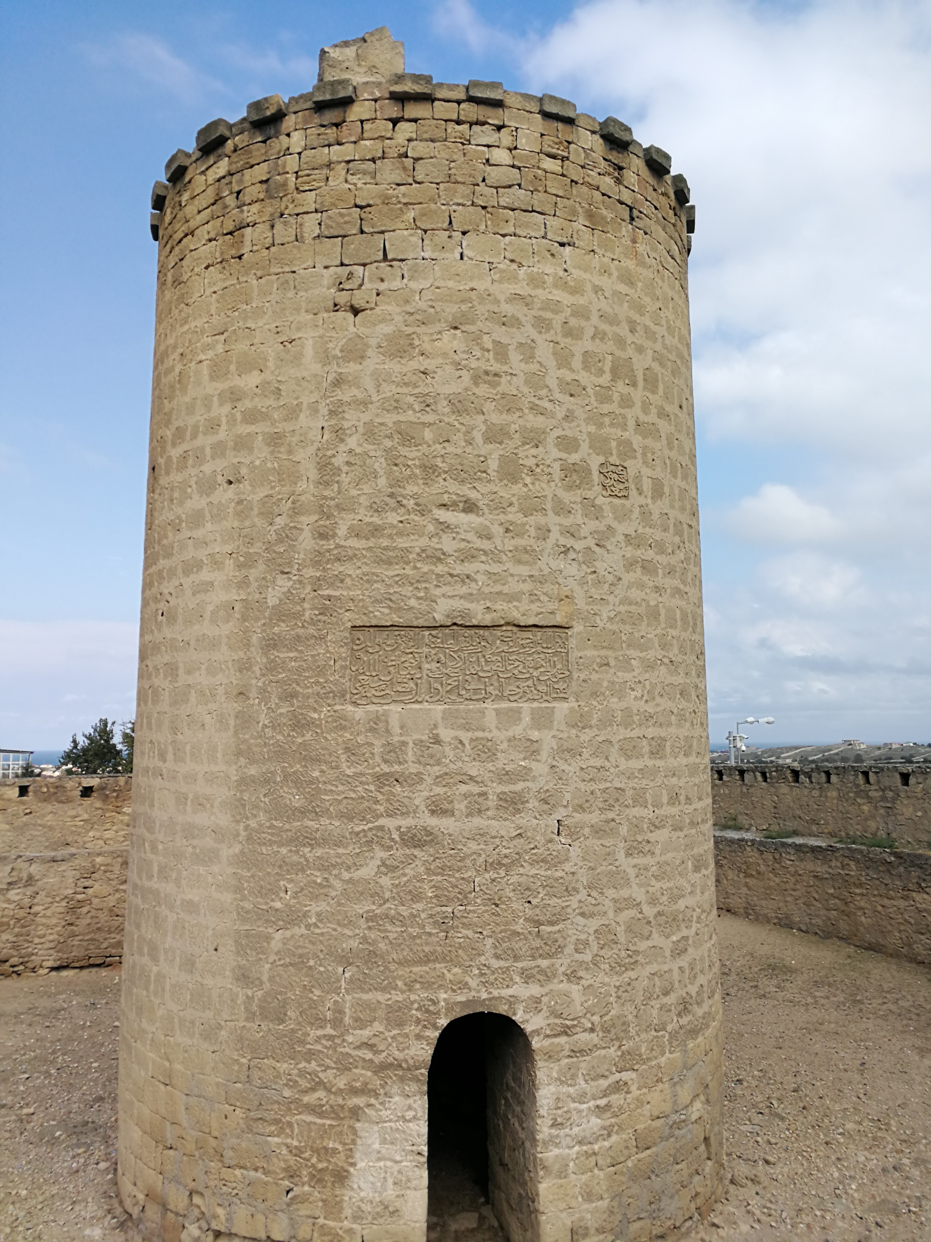 Нардаранская башня. 15 октября 2017 года